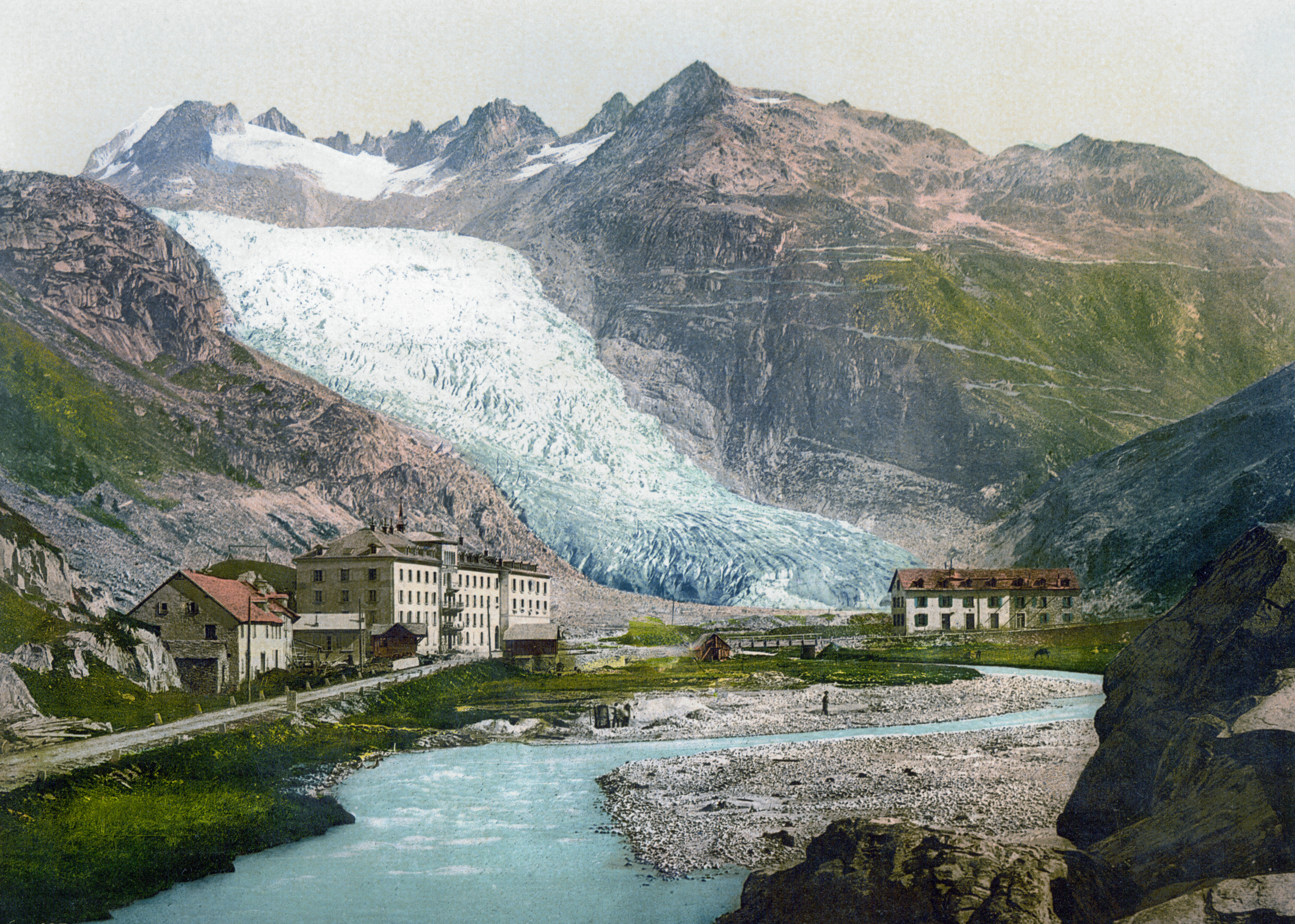 Der Rhonegletscher mit Gletsch und Furkapass um 1900